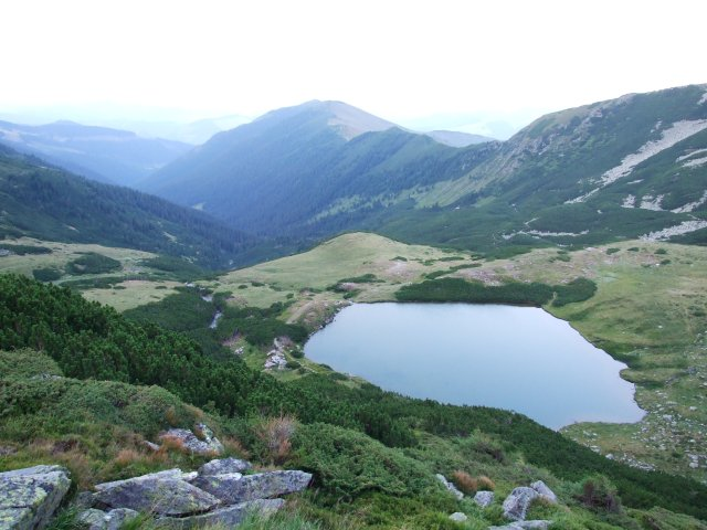 Lacul Lala Mare, jud. Bistrița-Năsăud